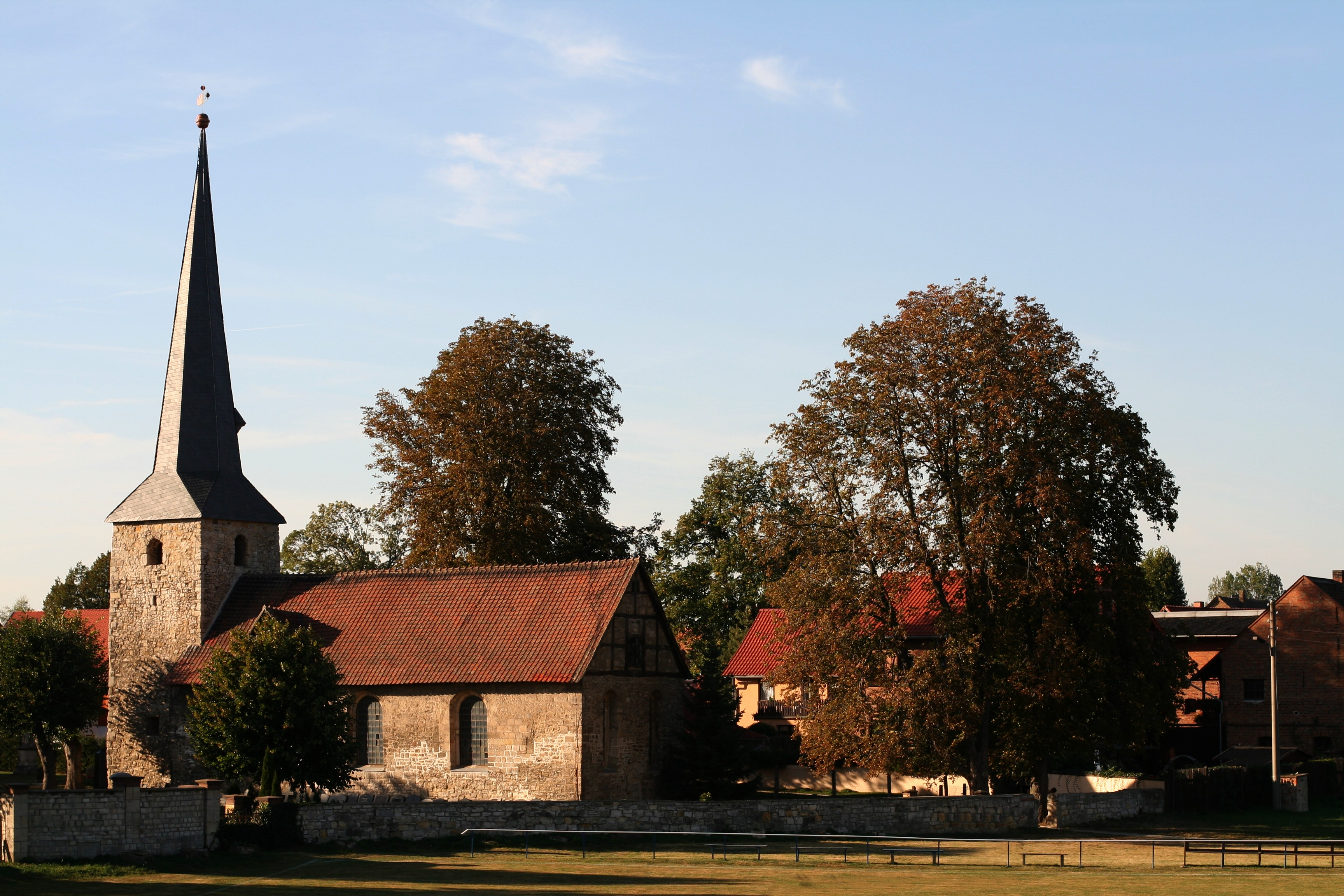 Kirche in Eilsdorf